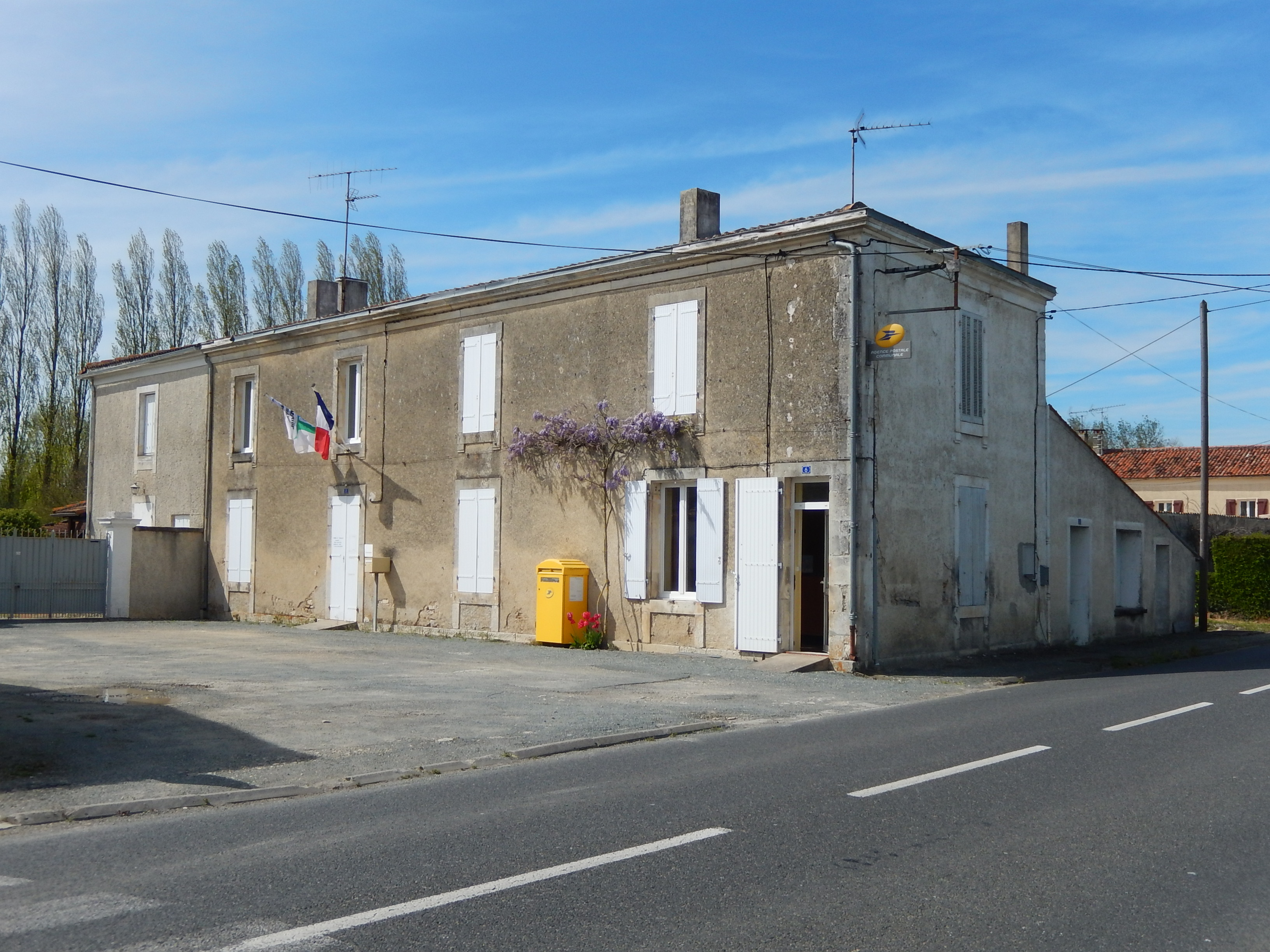 La mairie de la commune de Puyrolland, située dans le lieu-dit de Tournay.